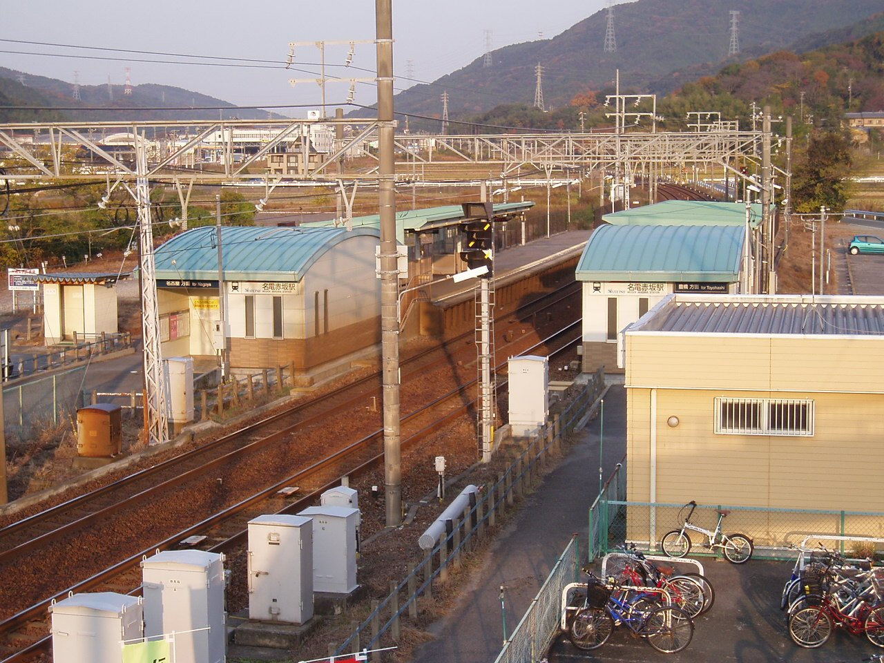 名電赤坂駅全体 画像上が名古屋方面